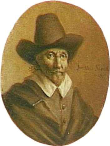 Portret van Emanuel de Witte. oil on copper. 10.2 × 8.2 cm (4 × 3.2 in). Amsterdam, Christie's (11 October 1997).